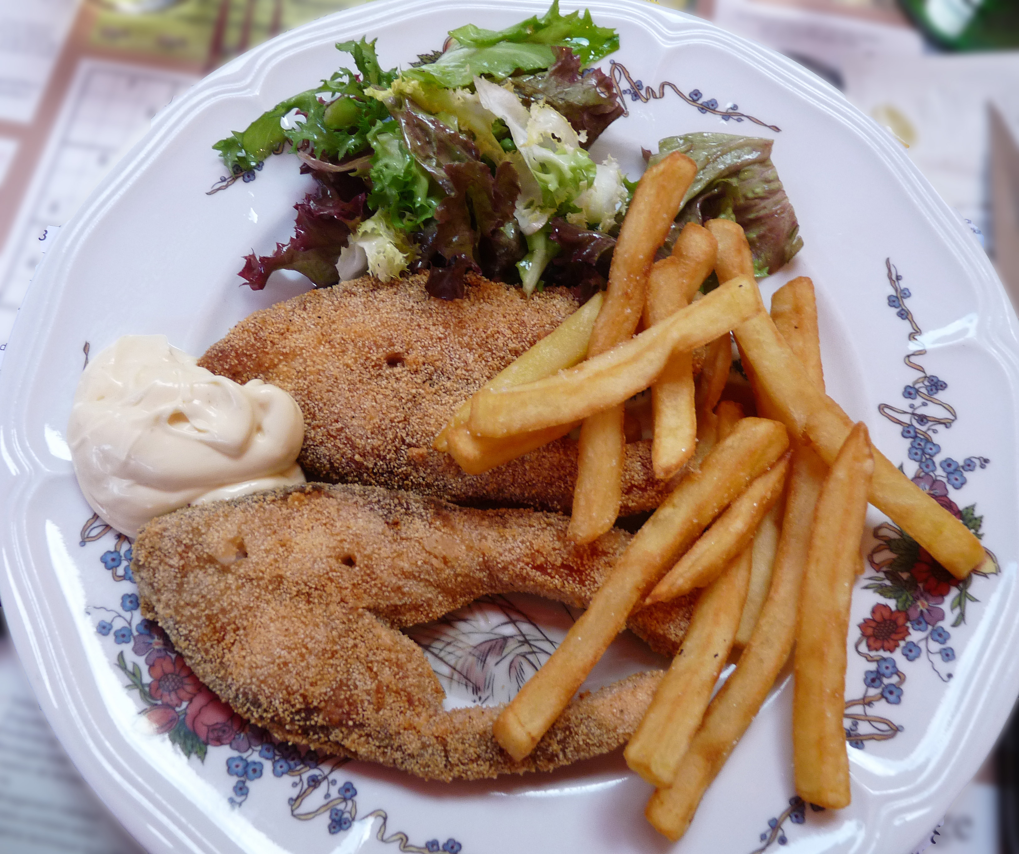 Darnes de carpe frite, une spécialité du Sundgau (Alsace), servies traditionnellement avec de la mayonnaise, de la salade et des frites. Ferrette (Haut-Rhin)